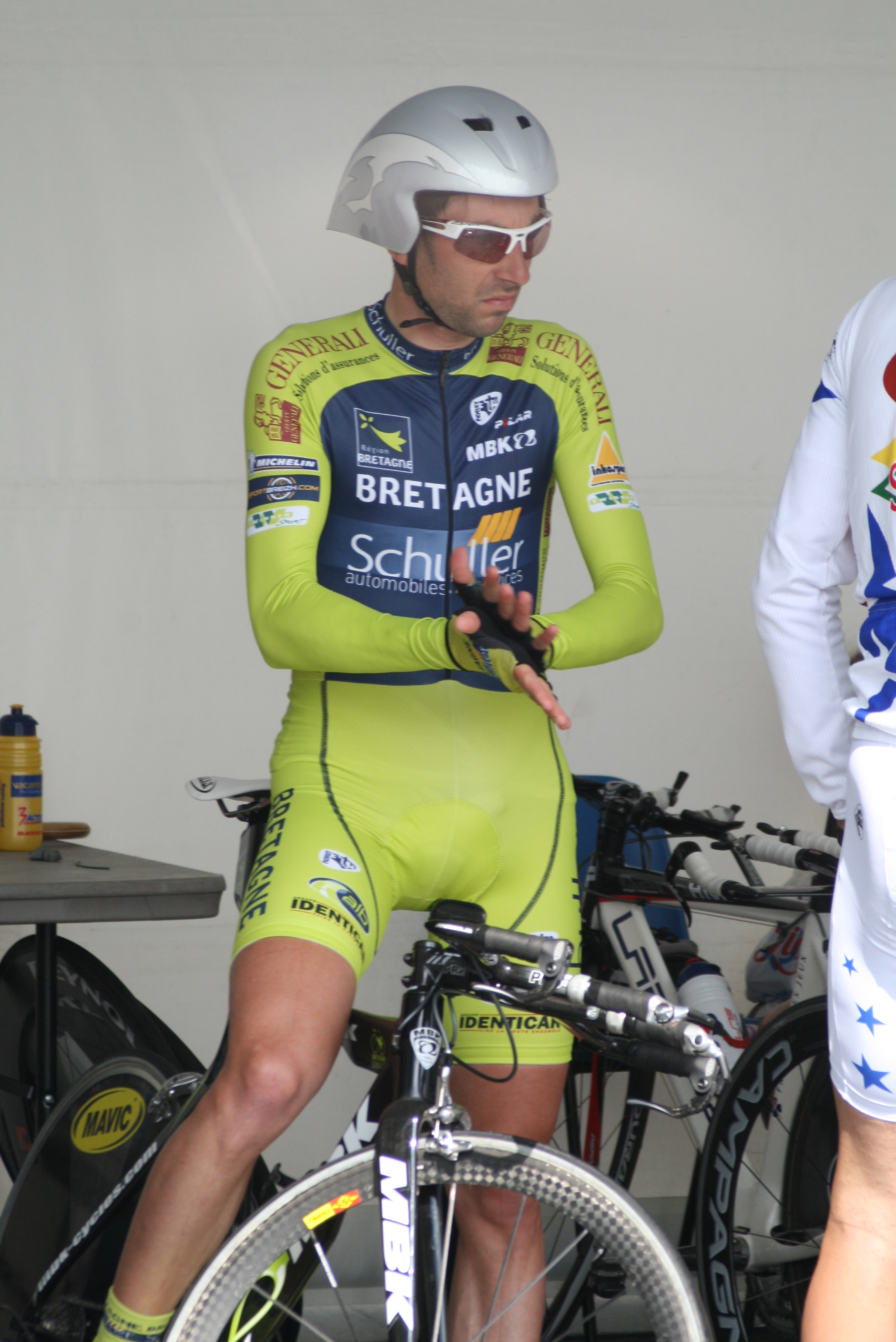 Sébastien Duret, durant les Quatre jours de Dunkerque 2009, à Douai